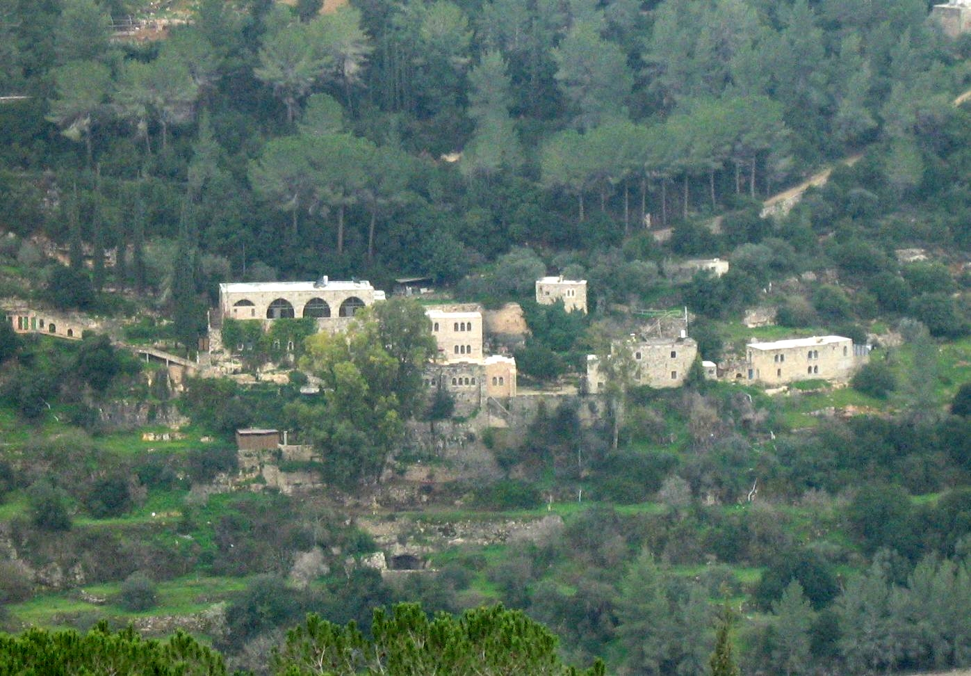 מנזר יוחנן במדבר